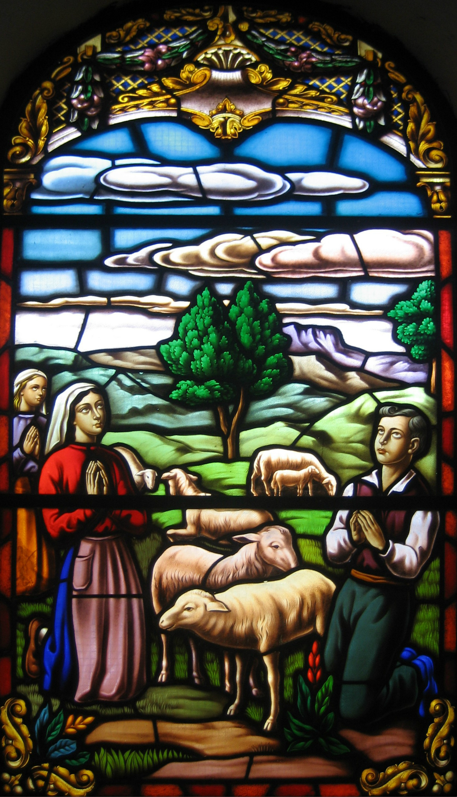 Cuba, Parroquia de San José de Jatibonico: Vitral de la Virgen de Fátima